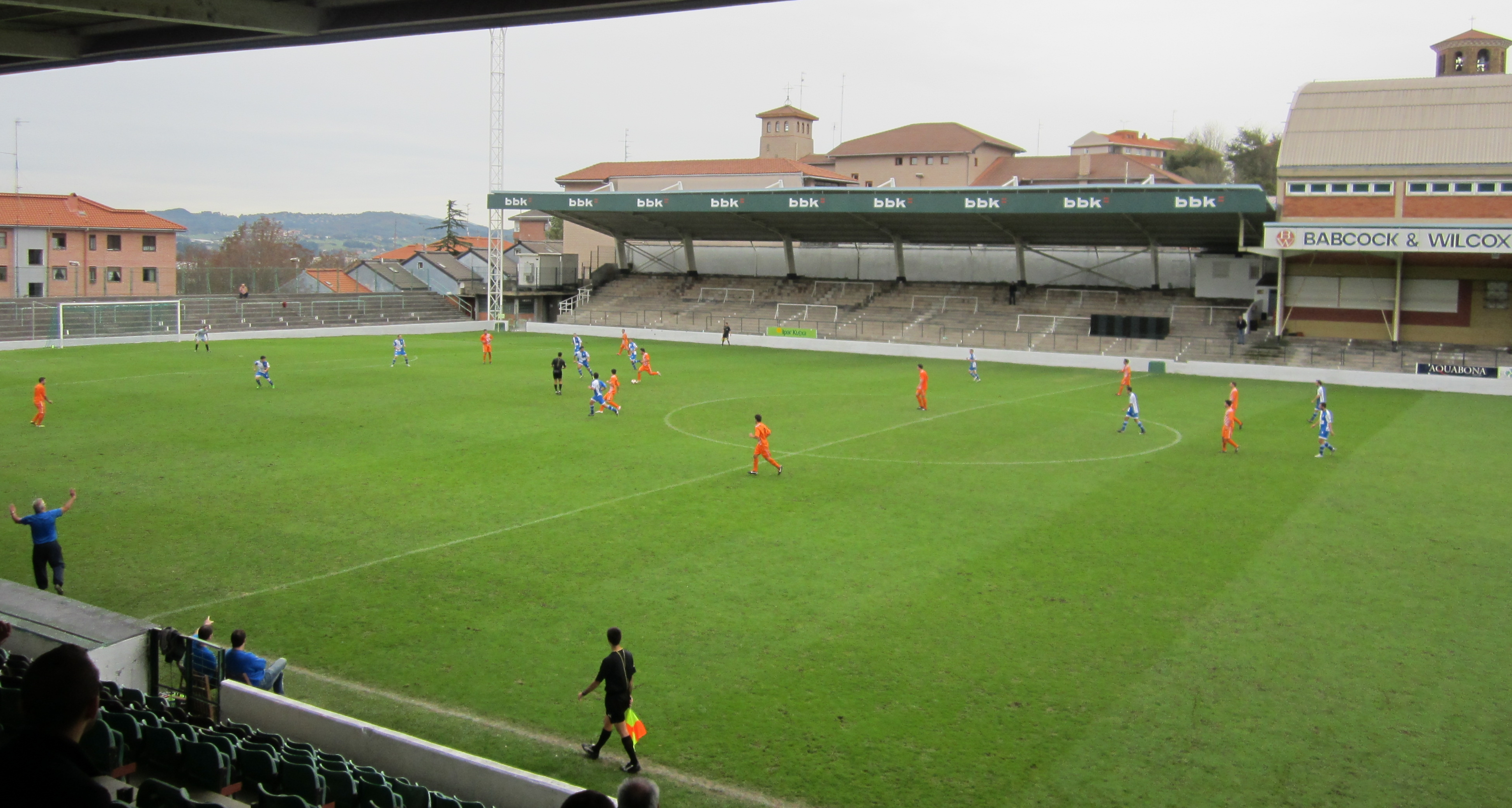 Partido de fútbol en el Campo Municipal de Las Llanas, Sestao, Vizcaya, 1 de noviembre de 2013.